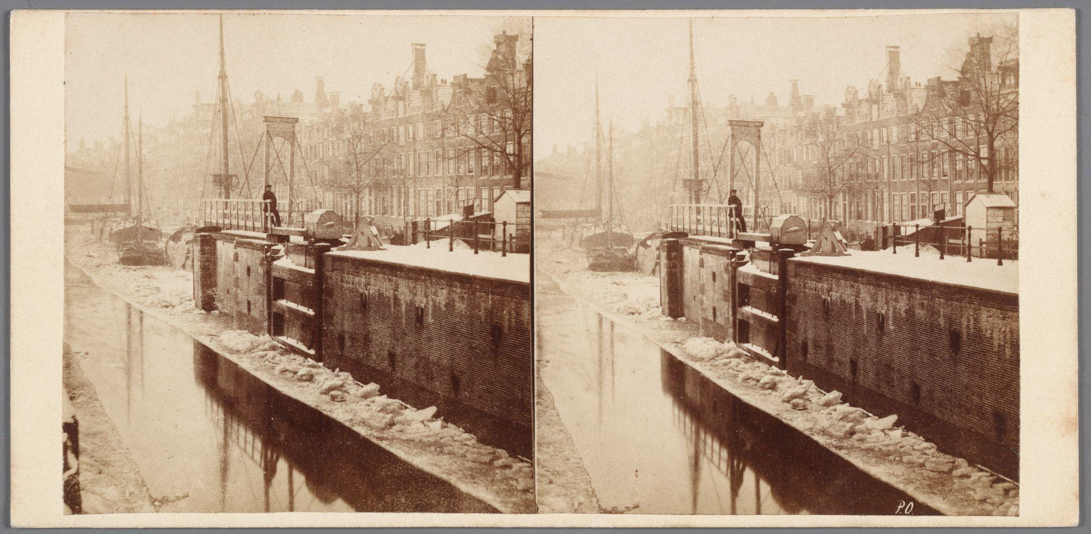 Beschrijving Nieuwe Herengracht 179-211 (v.l.n.r.) Met op de voorgrond de Rapenburgerschutsluis, gezien vanaf de Scharrebiersluis. Wintergezicht. Uit de serie Vues de Hollande, nr. 93. Documenttype foto Vervaardiger Oosterhuis, Pieter Collectie Collectie Stadsarchief Amsterdam: stereofoto's Datering 1860 t/m 1865 Inventarissen Afbeeldingsbestand 010007000645 Generated with Dememorixer